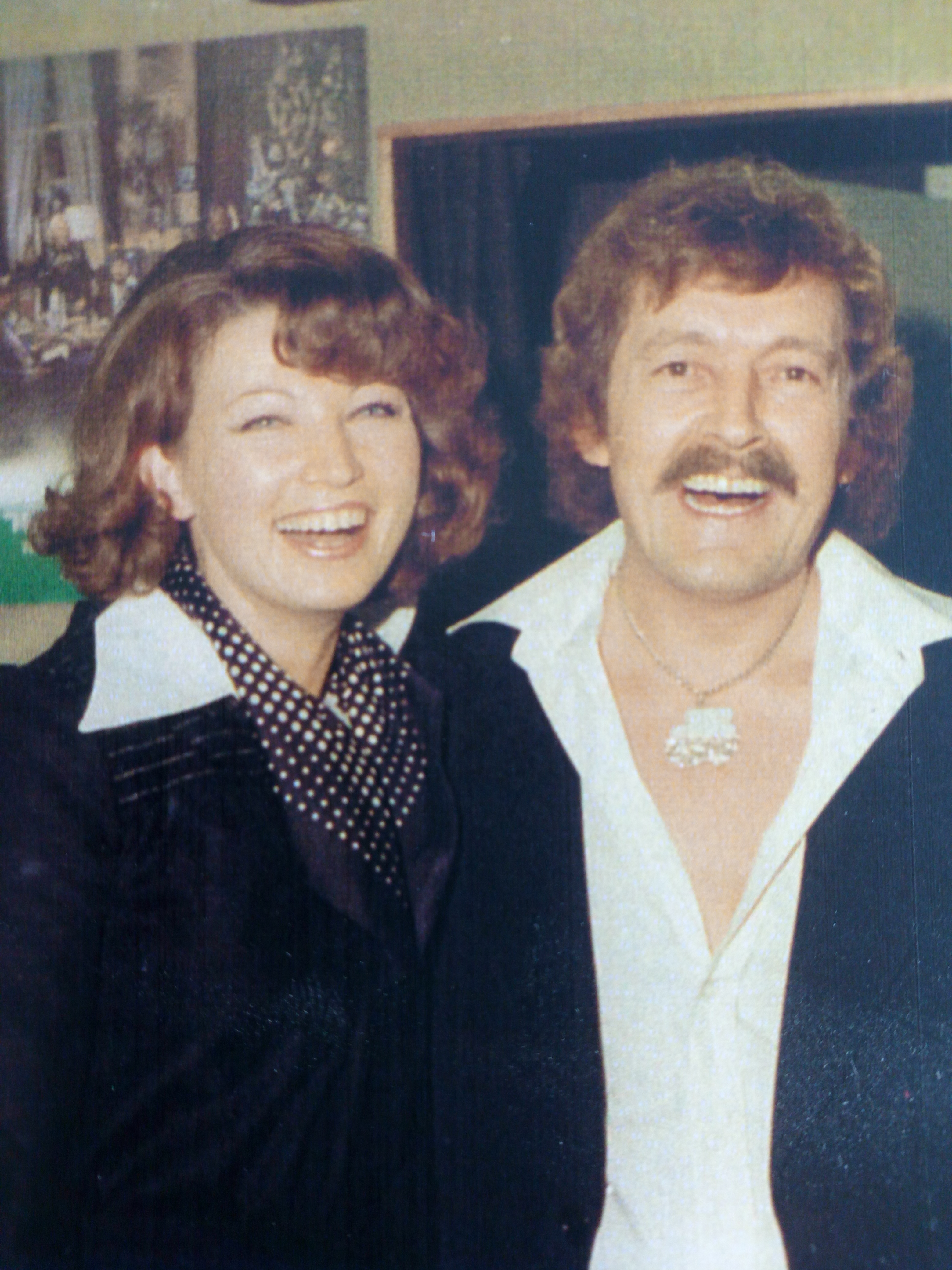 Elly de Nijs en Dutch saxophonist André Moss